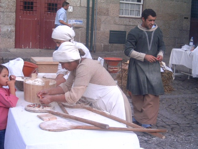 Feira Joanina em Guimarães: fazendo o "bolo" com carne de porco Photo by Manuel Anastácio